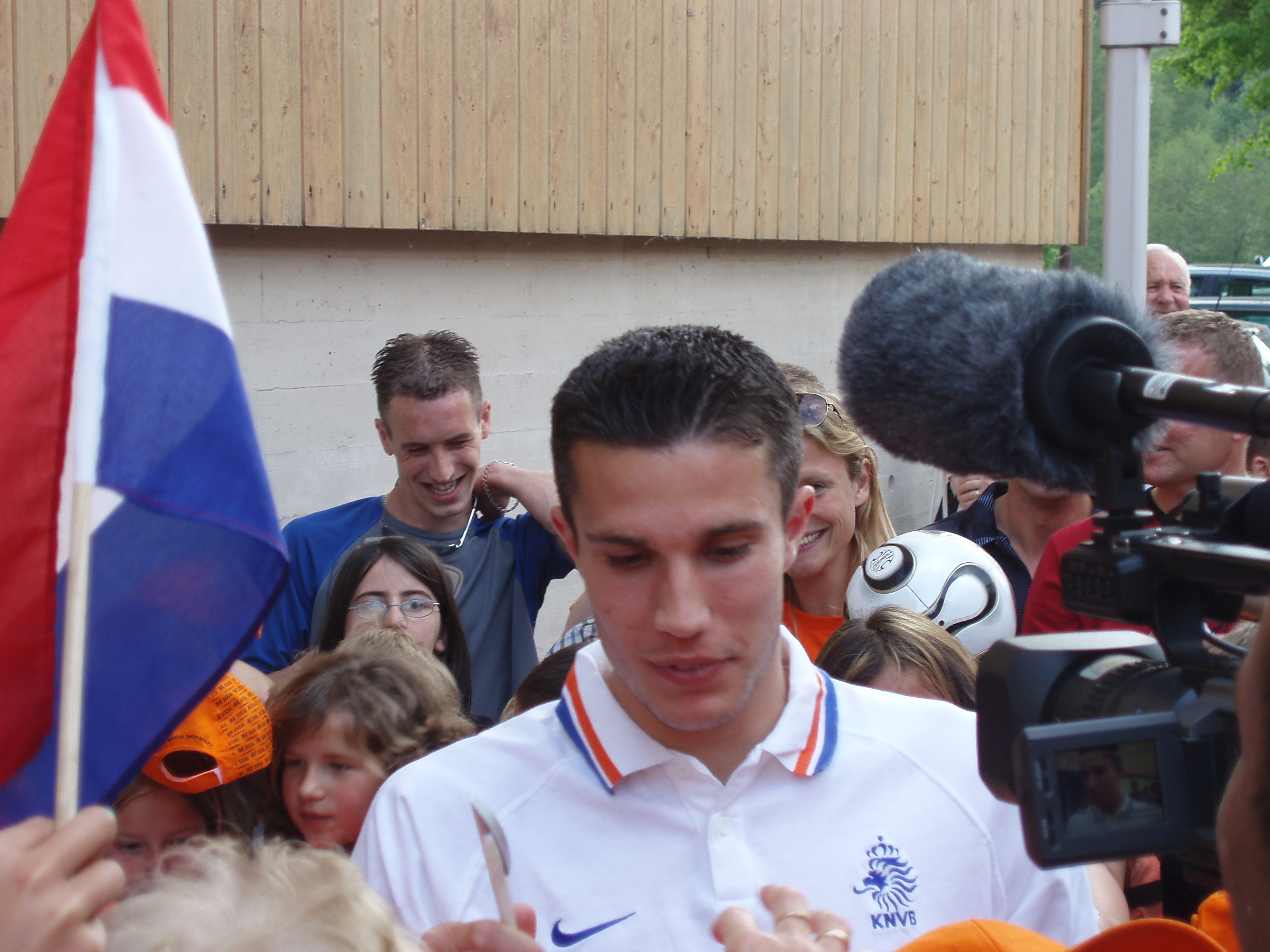 Robin van Persie, Spieler der niederländischen Fußballnationalmannschaft